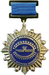 Нагрудный знак "Заслуженный энергетик Республики Казахстан"